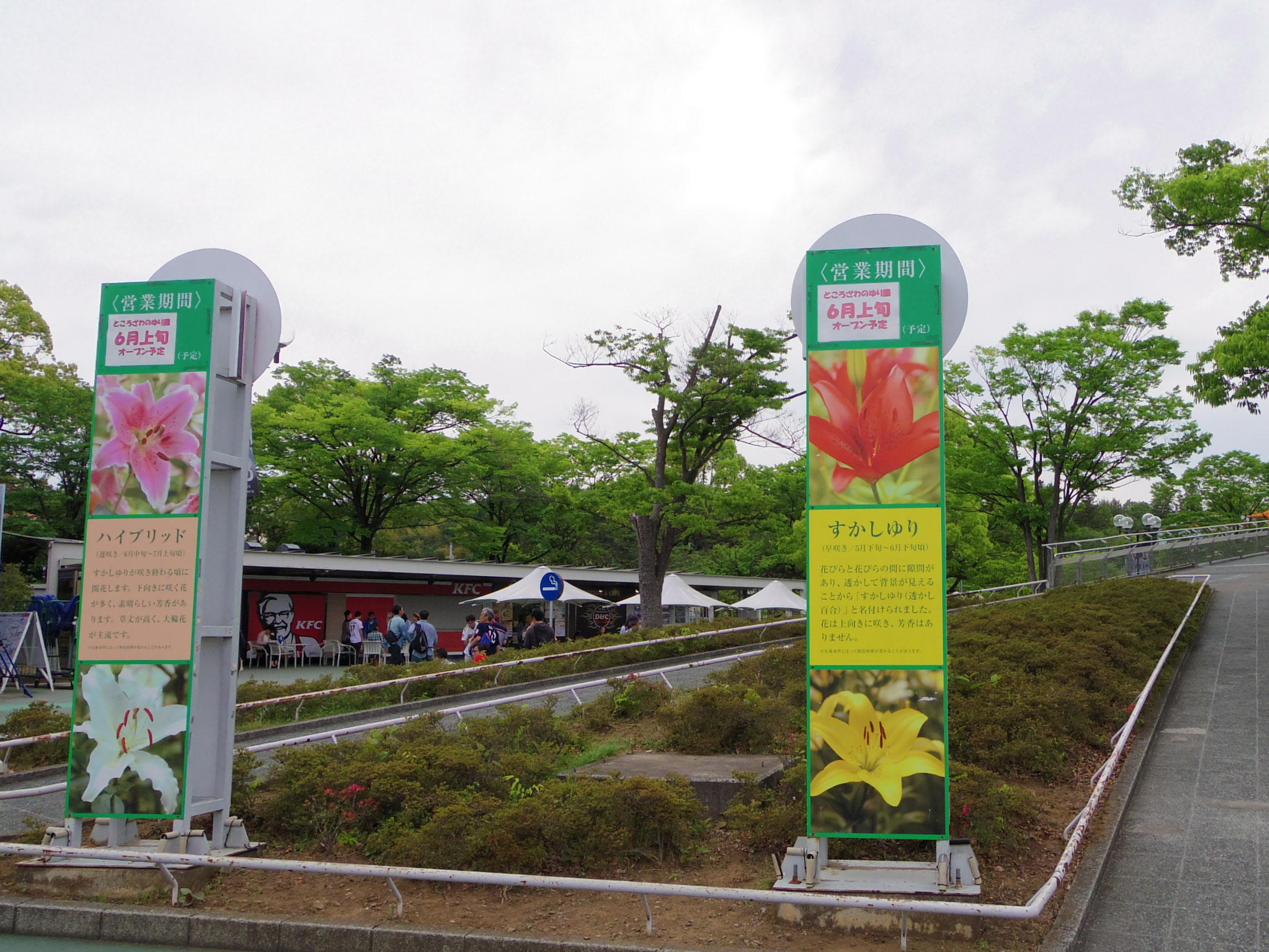 「ところざわのゆり園」（埼玉県所沢市）の看板。これは2015年のもの。西武球場前駅前にて撮影。